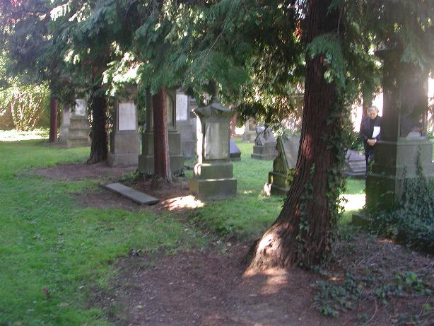 Blick auf den jüdischen Friedhof in der Binsfelder Straße in Düren